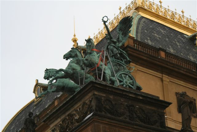 Traga na Národním Divadle v Praze